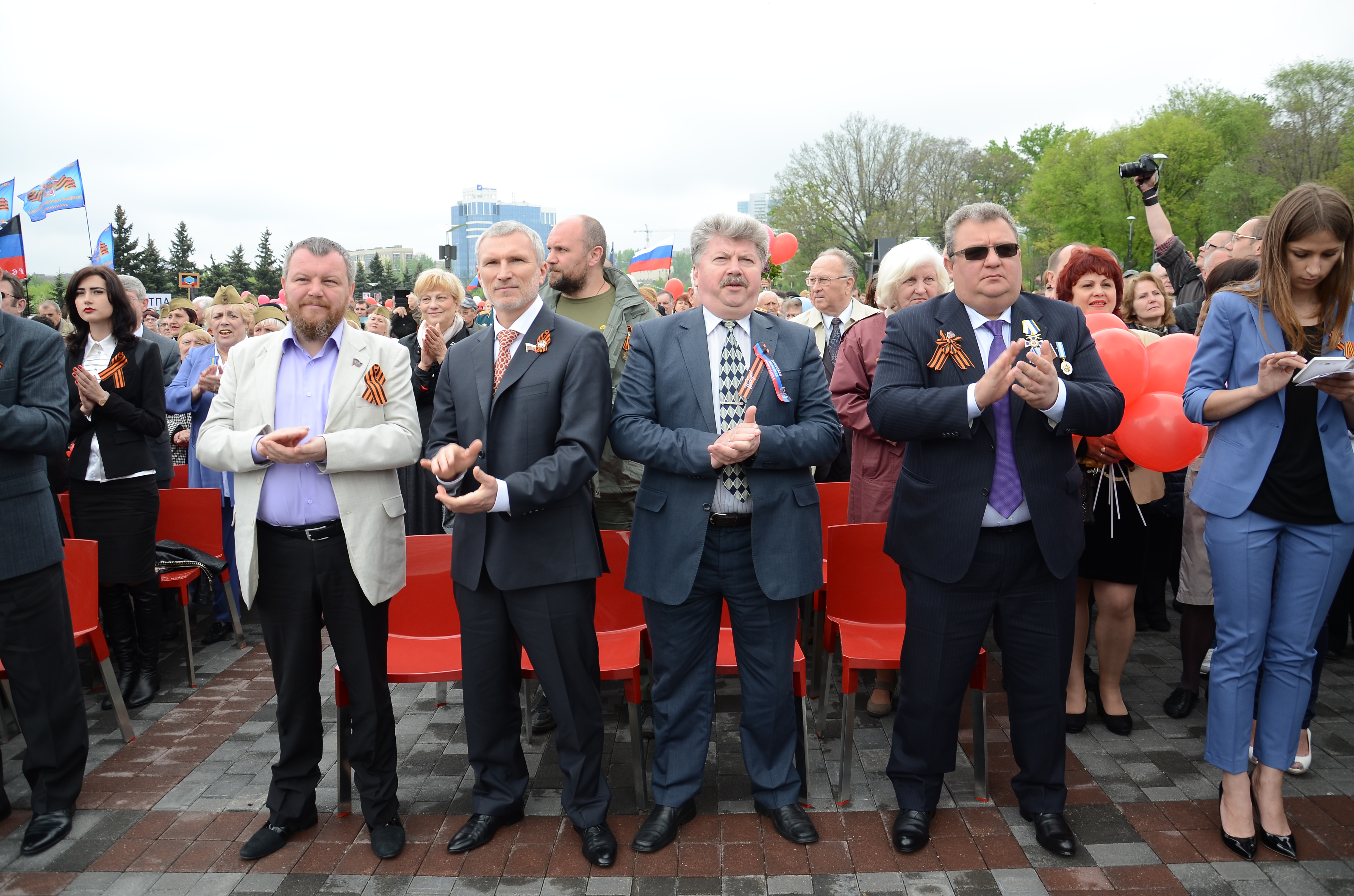 День Победы в Донецке